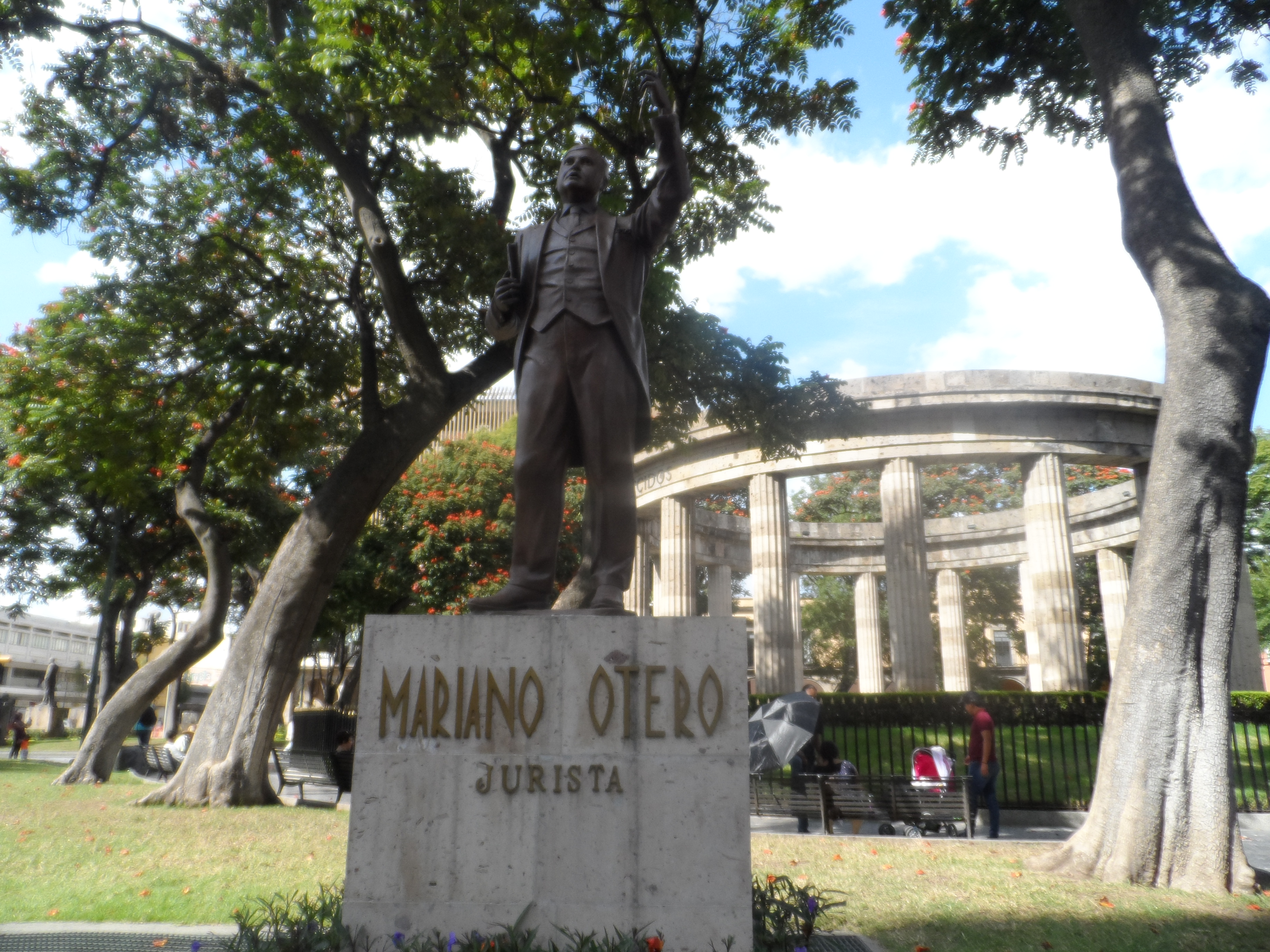 Estatua del jurista jalisciense Mariano Otero en la "Rotonda de los Jaliscienses Ilustres".